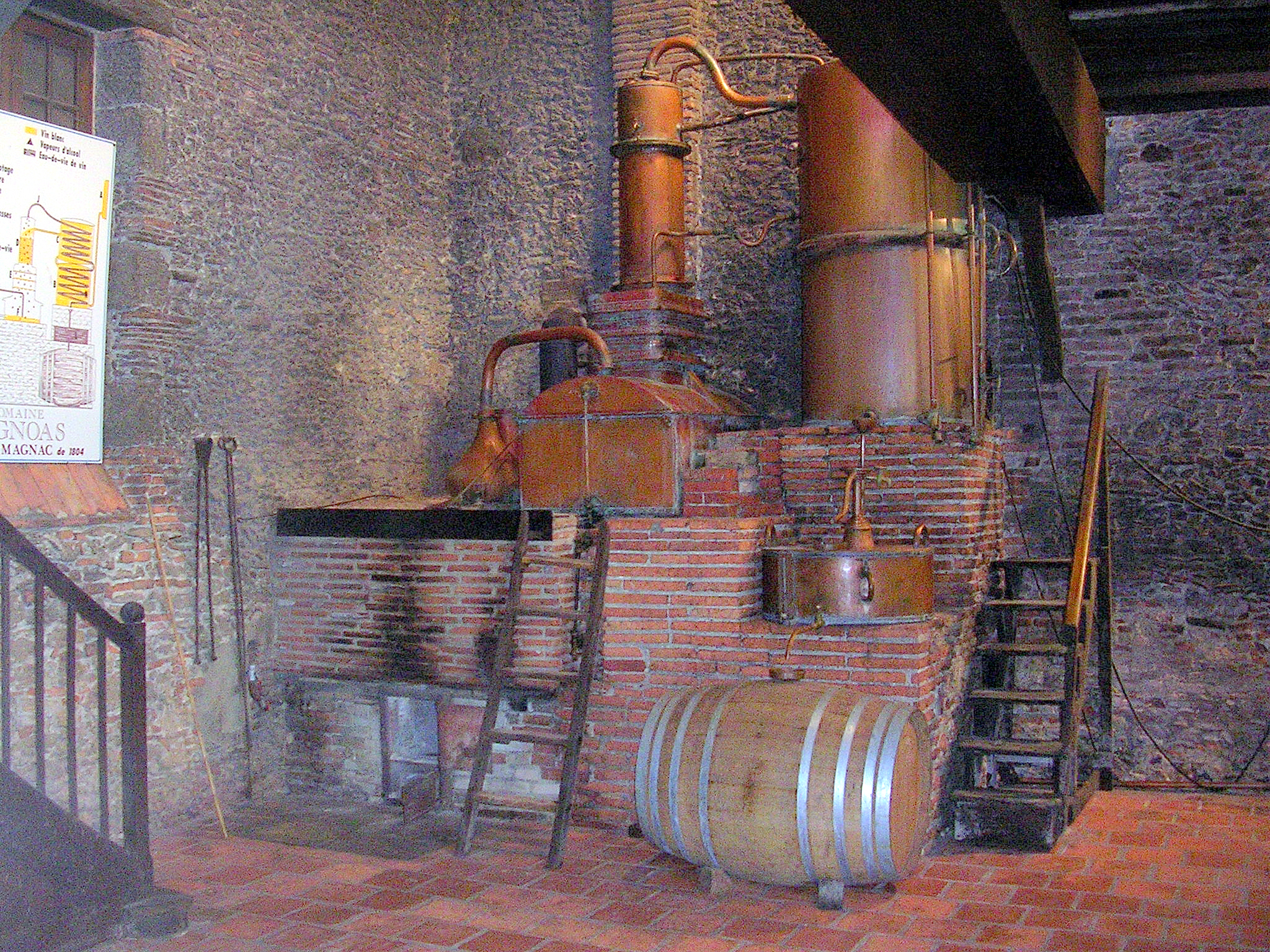 Alambic de 1804 du domaine d'Ognoas, à Arthez-d'Armagnac, dans le département français des Landes